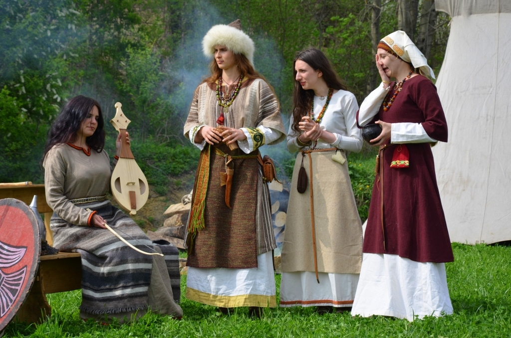 Wikingerlager 2013 in Ostbeskiden